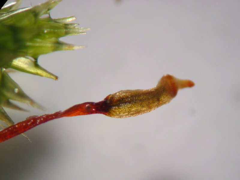 Eichhörnchenschwanz-Weißzahnmoos (Leucodon sciuroides), Sporogon, Vergrößerung: 30x